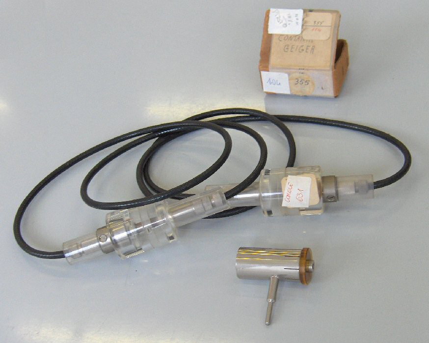 Contatore Geiger del Laboratorio di Fisica del Liceo Scientifico e Classico di Gallarate (VA), fotografato dal prof. Franco Maria Boschetto; immagine assolutamente priva di copyright (autorizzazione della prof.ssa Maria Rola, subconsegnataria del detto laboratorio)